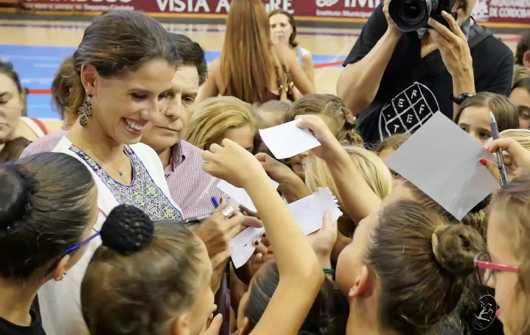 La gimnasta rítmica española Lourdes Mohedano en el homenaje en su honor en el Palacio Municipal de Deportes Vista Alegre en Córdoba el 6 de septiembre de 2016, tras lograr la plata olímpica en Río.